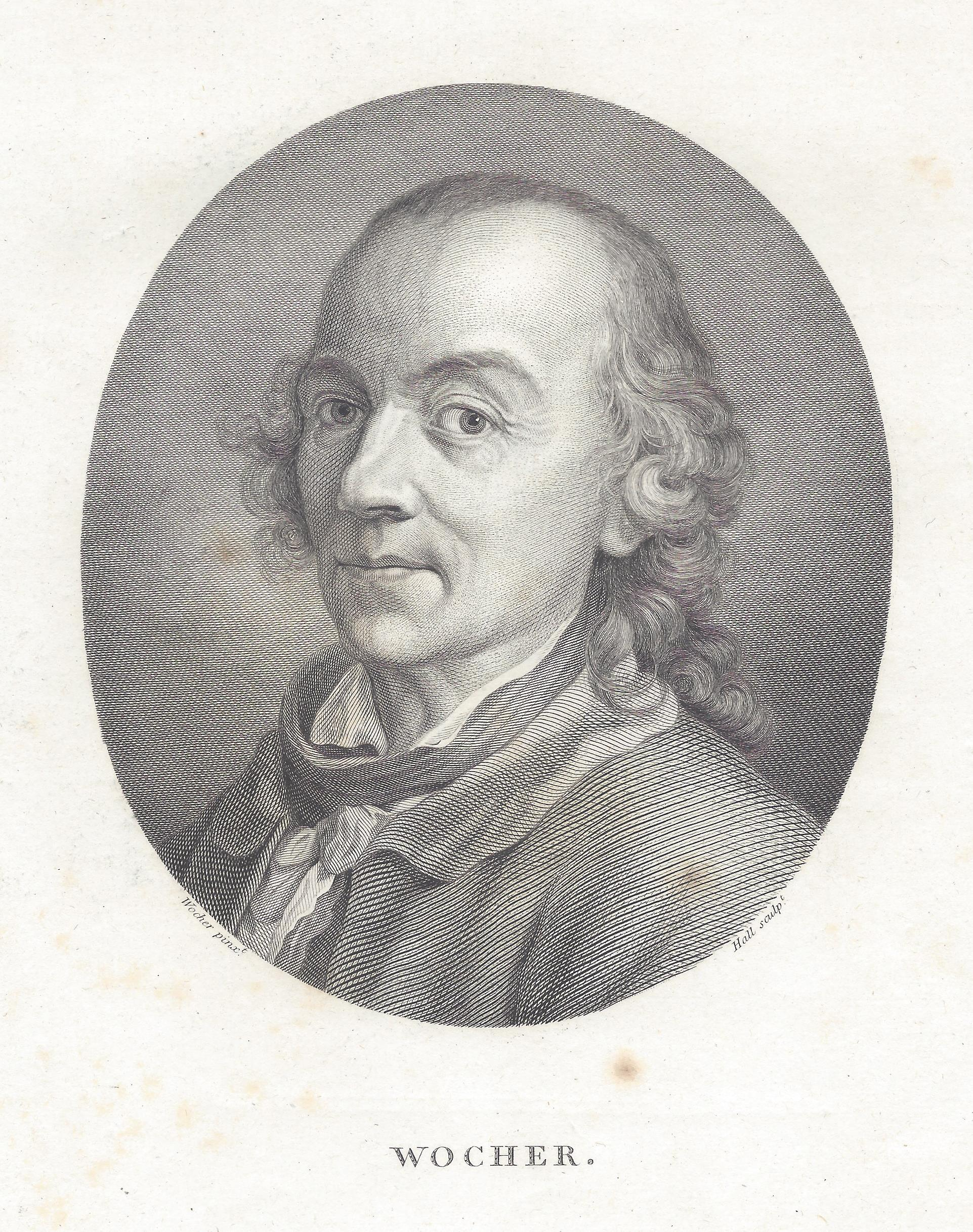 Marquard Wocher, gezeichnet von Tiberius Wocher. Kupferstich von John Hall nach Johann Heinrich Lips, für die englische Ausgabe von Lavaters Physiognomischen Fragmenten: London, John Murray, H. Hunter, and T. Holloway, 1789